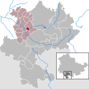 Ehrenberg in Thuringia - district Hildburghausen